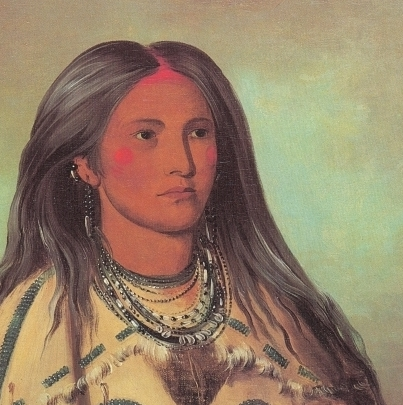 Sha-kó-ka (mint), a Mandan girl.